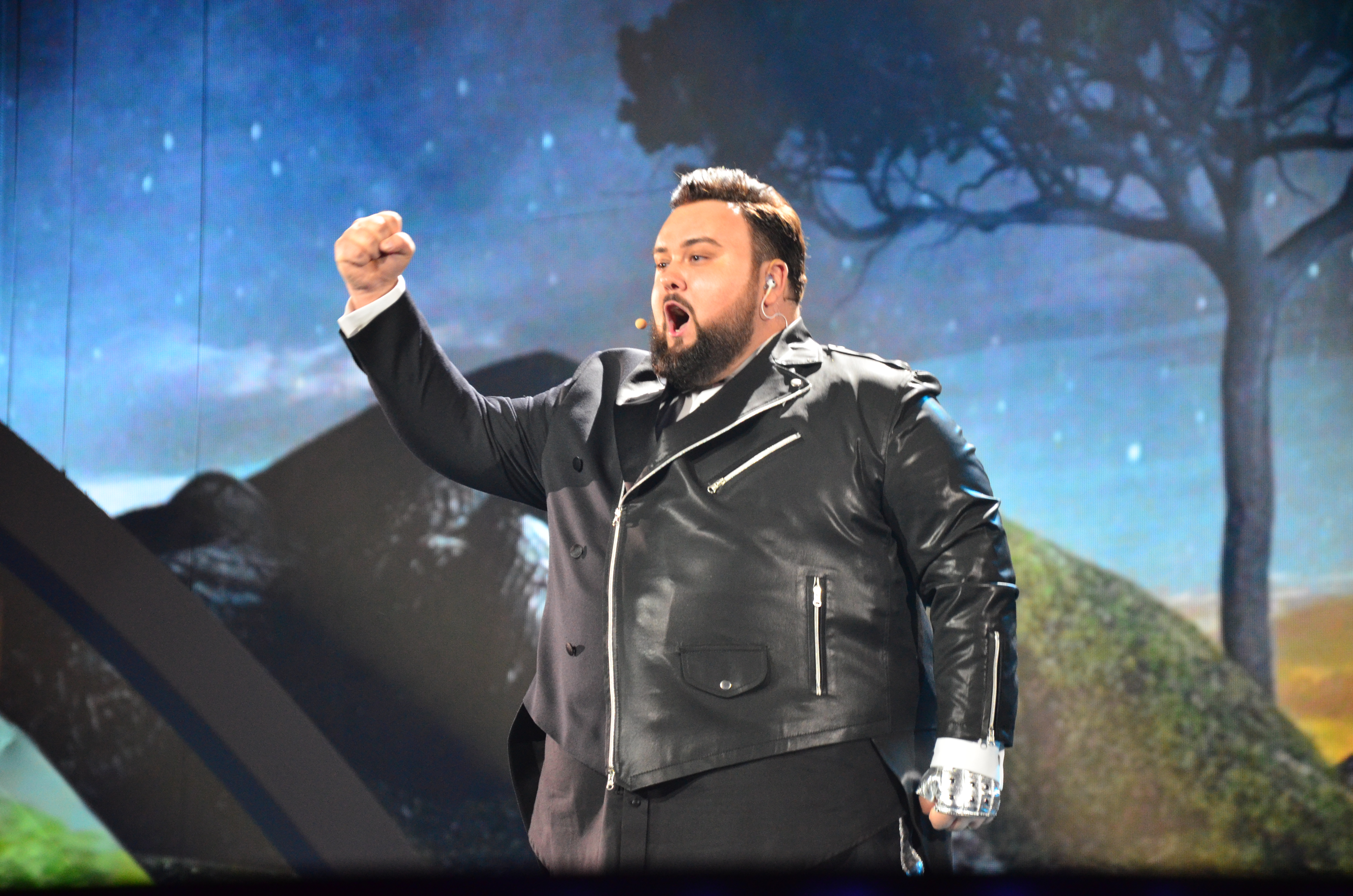 10 травня 2017 року у Києві відбулась генеральна репетиція 2 півфіналу "Євробачення".